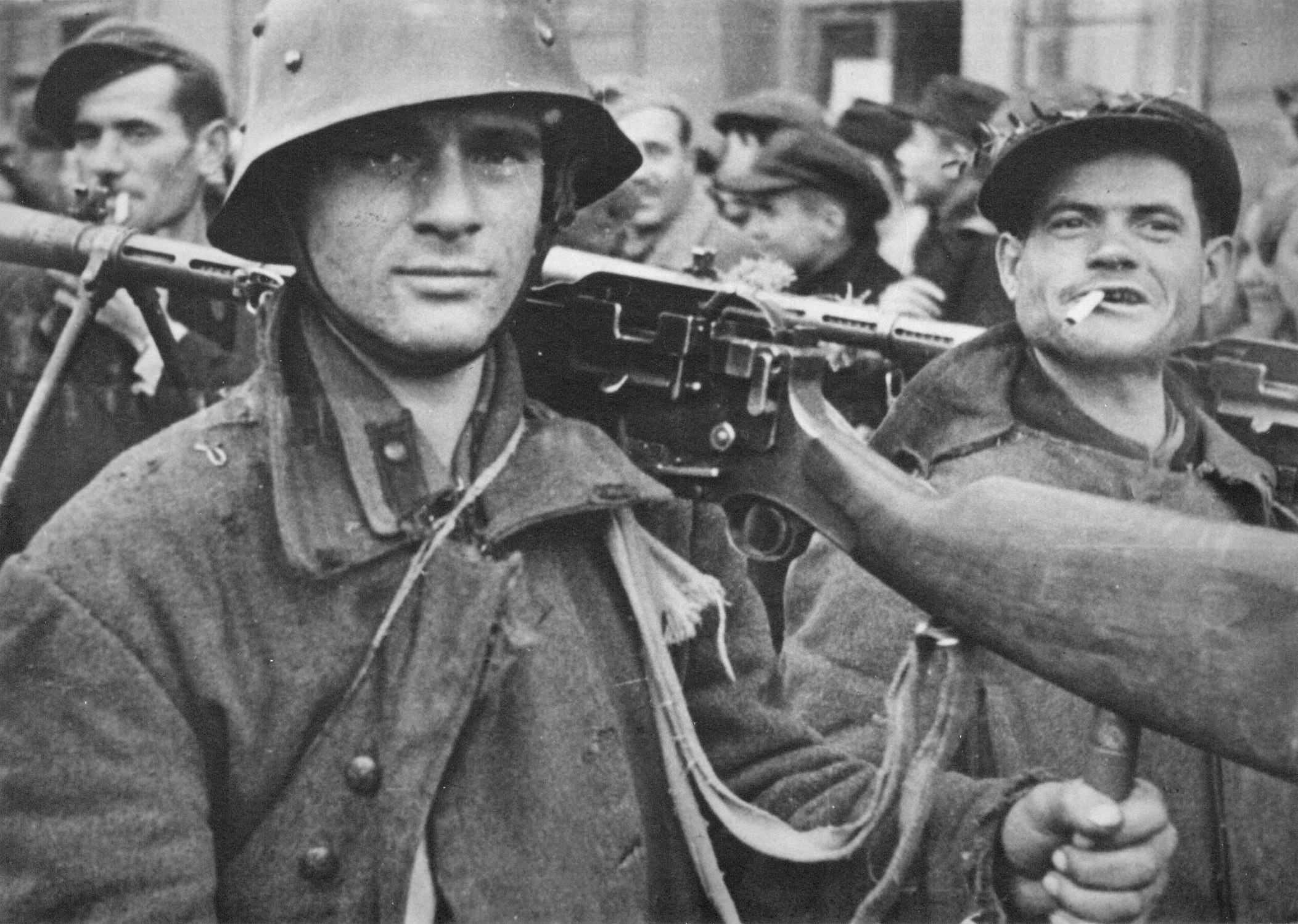 Srpskohrvatski / српскохрватски: Makedonski partizani ulaze u Skoplje, novembra 1944.